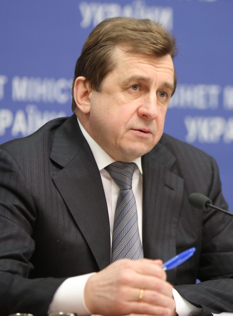 министр транспорта и связи Украины, олигарх, народный депутат Украины